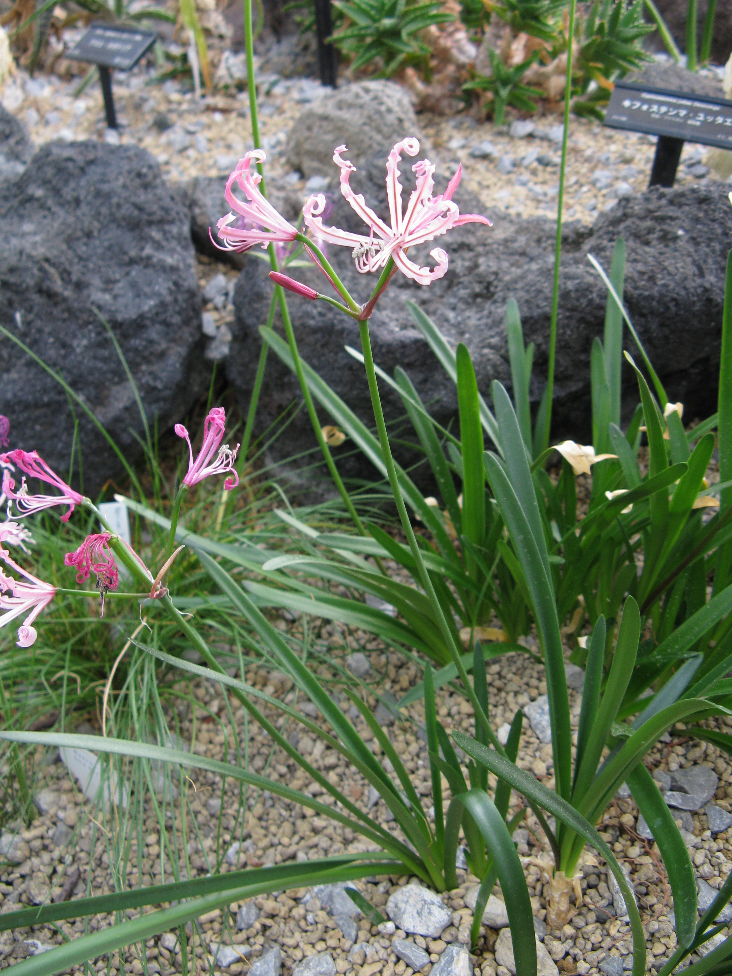 Scientific name Nerine humilis Place:Sakuya Konohana Kan,Osaka,Japan